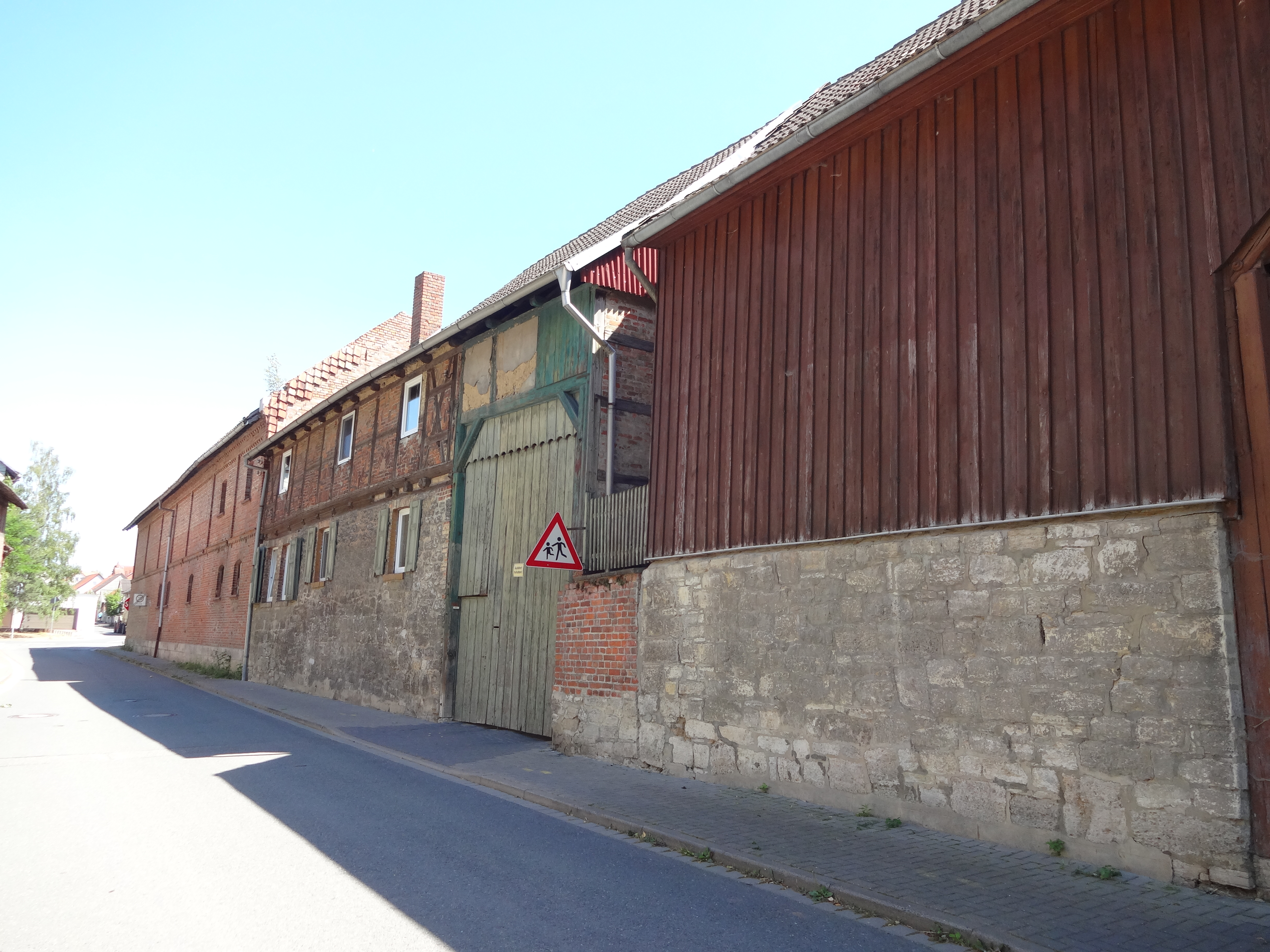 denkmalgeschützter Bauernhof in der Kirchstraße 1 in Dedeleben